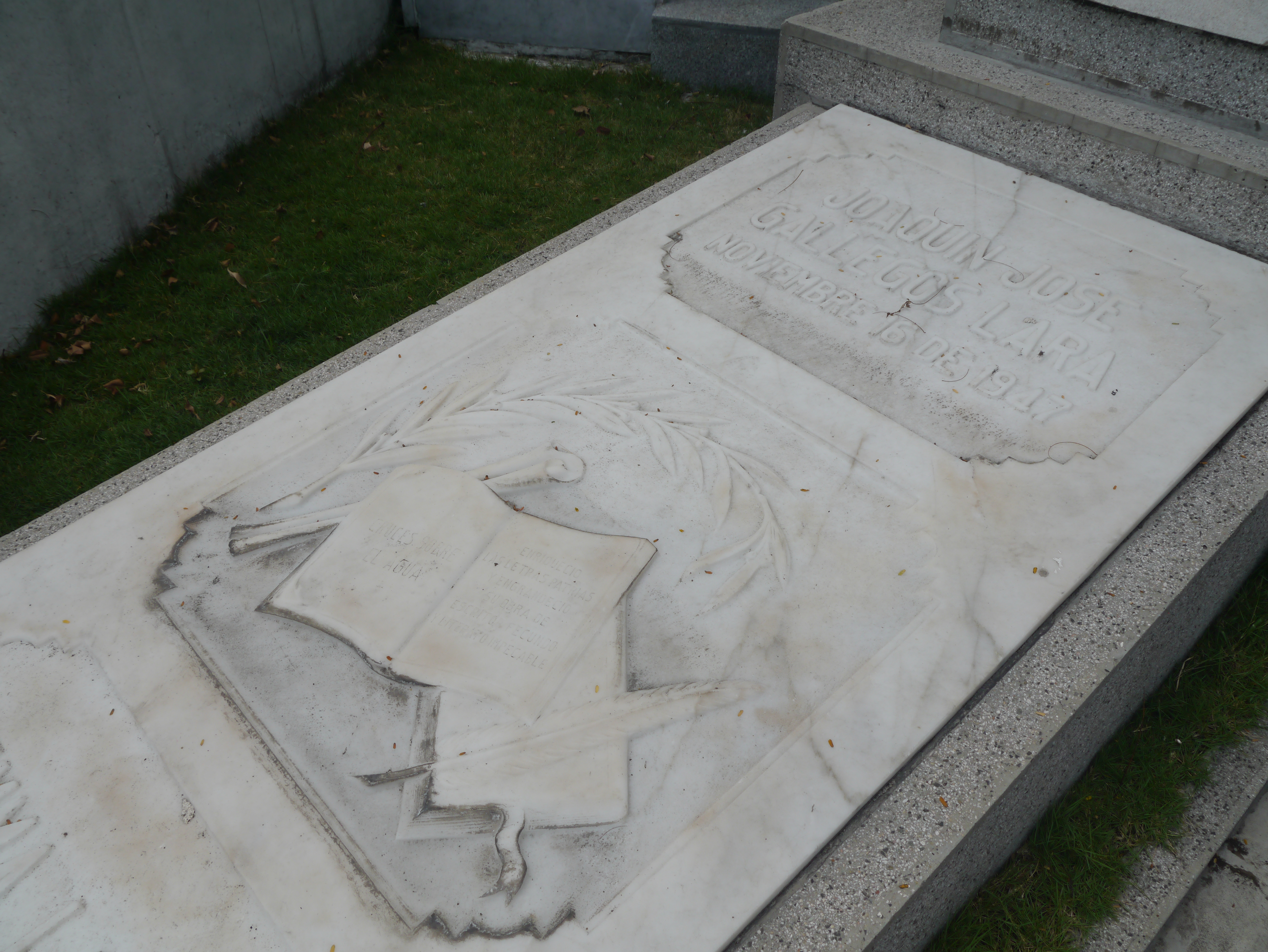 Tumba de Joaquín Gallegos Lara, escritor guayaquileño en el Cementerio General de Guayaquil